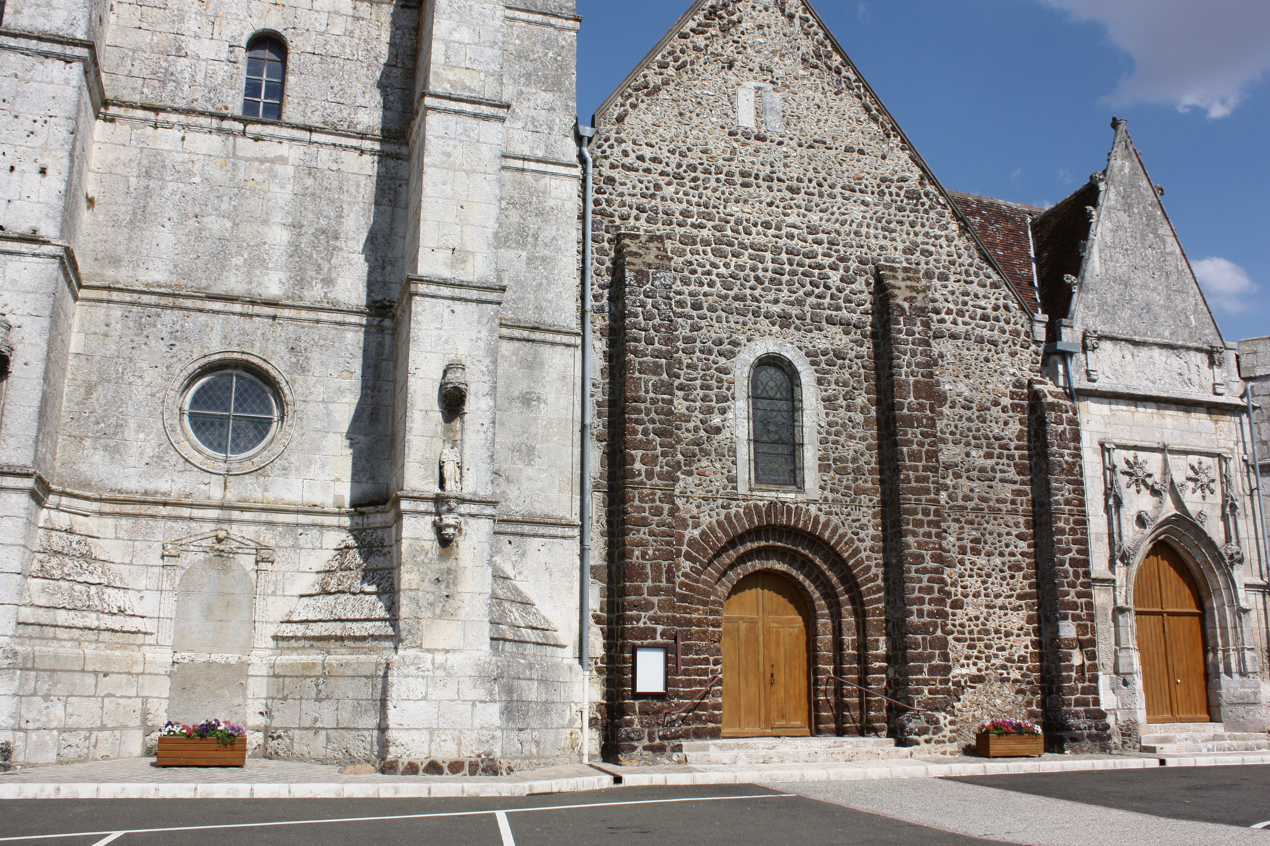 Arrou - Eglise Saint-Lubin Façade Ouest